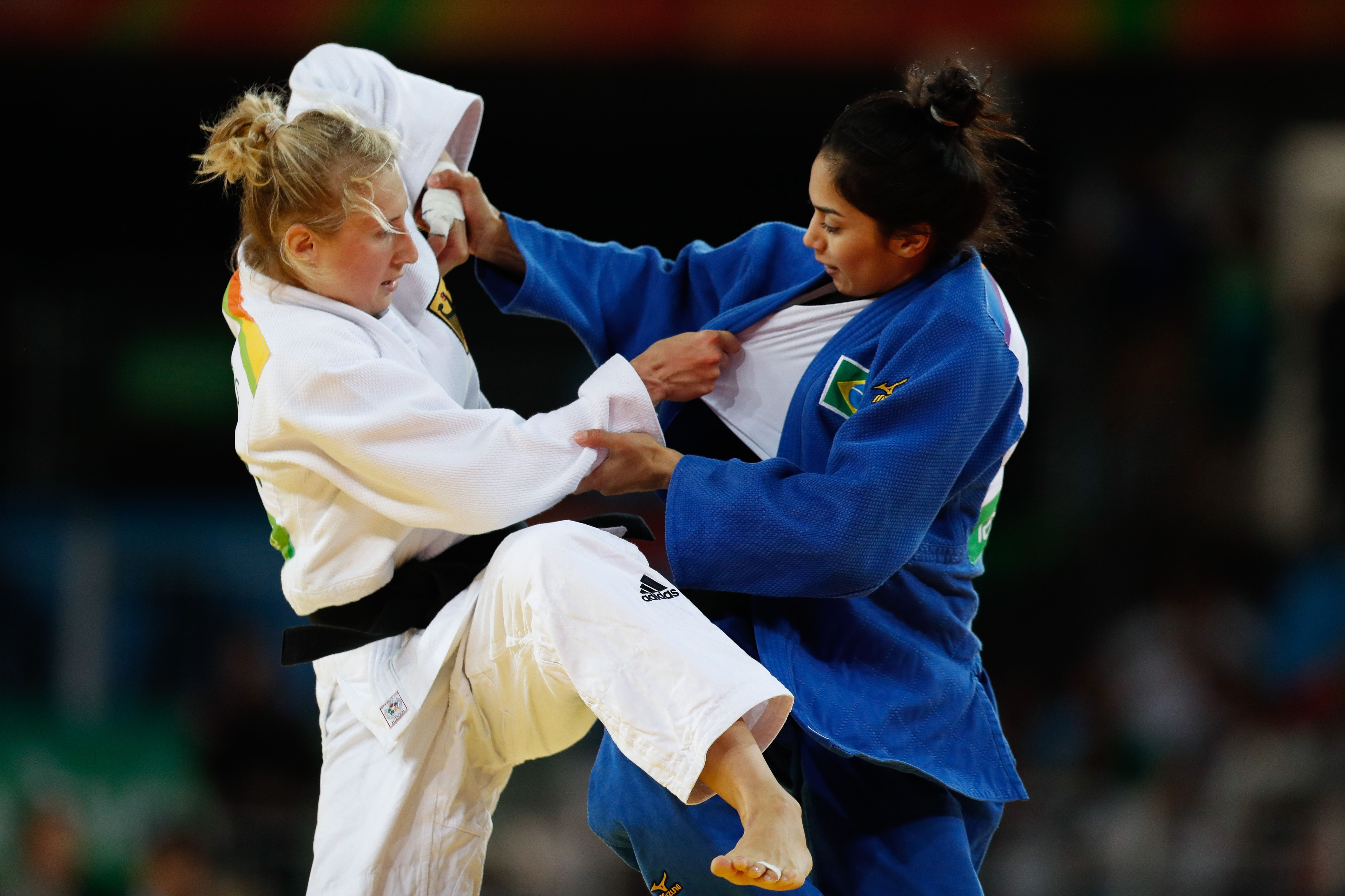 Judô na Arena Carioca dos Jogos Olímpicos Rio 2016 Rio de Janeiro - Mariana Silva, do Brasil, vence Martyna Trajdos, da Alemanha, na categoria atГ© 63kg do judГґ feminino na Arena Carioca dos Jogos OlГ­mpicos Rio 2016. (Fernando FrazГЈo/AgГЄncia Brasil)